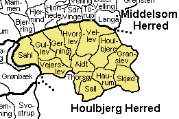 Houlbjerg Herred, Gl. Viborg Amt, Denmark. Map by Svend-Erik Christiansen.